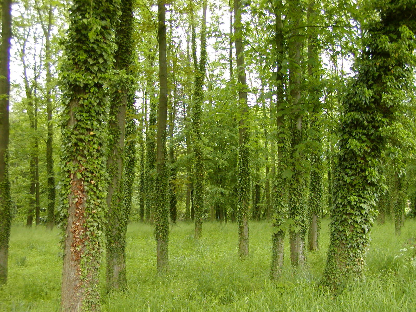 Efeu (Hedera helix) an Bäumen (u. a. Ahorn) im Schlosspark Ippenburg, Bad Essen, Landkreis Osnabrück.